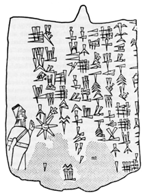 لوحهٔ برنزی با نوشته‌ای از شاه اَبدَدانَ که پیش از ۱۹۳۰ میلادی توسط ارنست هرتسفلد در همدان کشف شد و اکنون در موزهٔ متروپولیتن نیویورک نگهداری می‌شود.